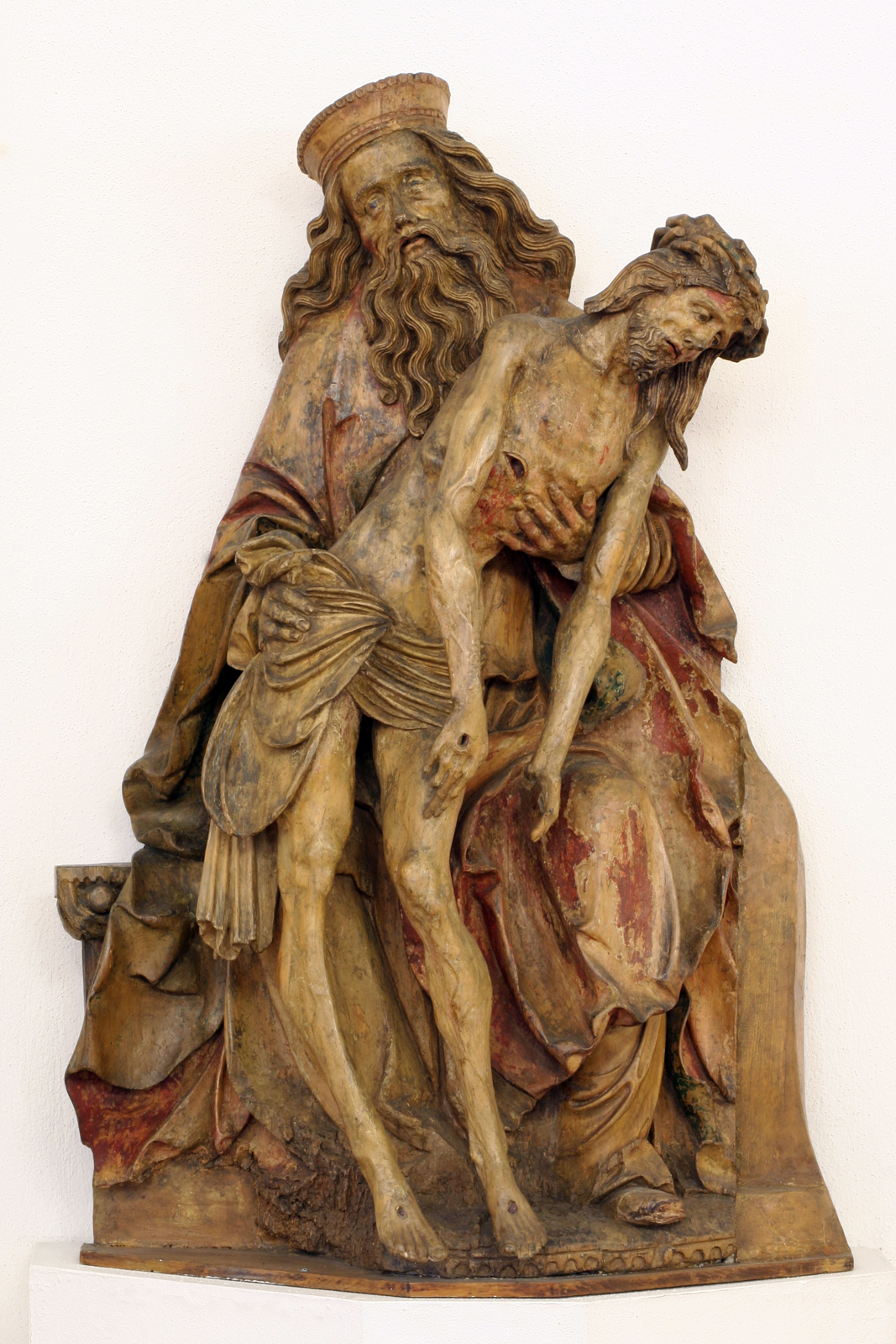 Svatá Trojice z Českých Budějovic, Alšova jihočeská galerie v Hluboké nad Vltavou